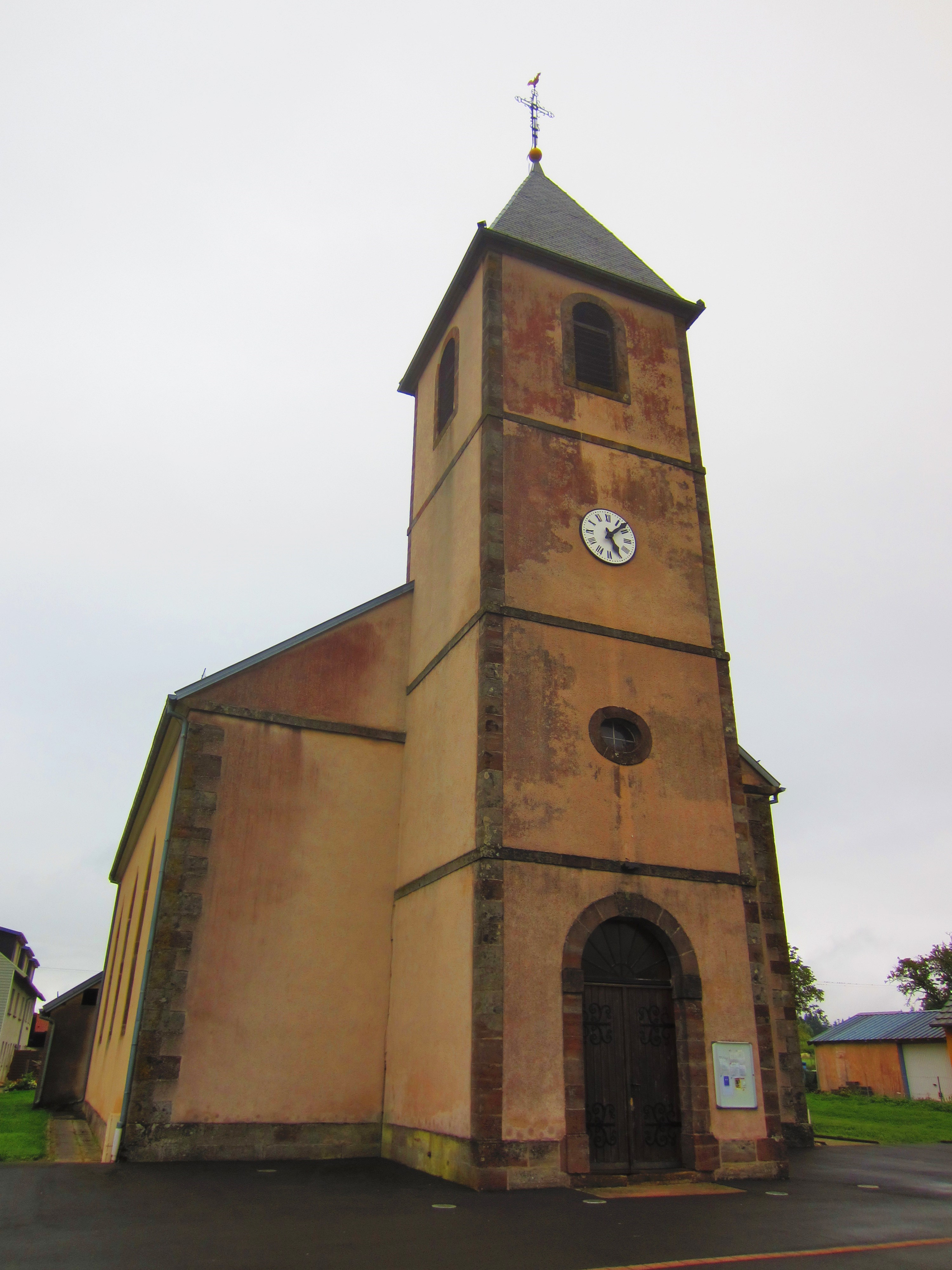 Eglise St Jean Kourtzerode